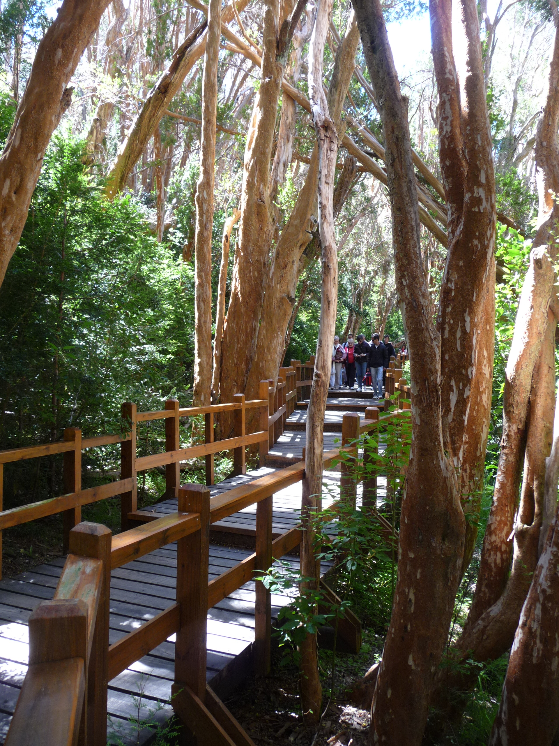 Pasarela para recorridos turísticos en el Parque Nacional Los Arrayanes.